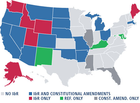 סמכויות של דמוקרטיה ישירה במדינות שונות בארצות הברית